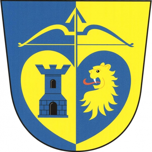 znak, Lovčovice, okres Třebíč